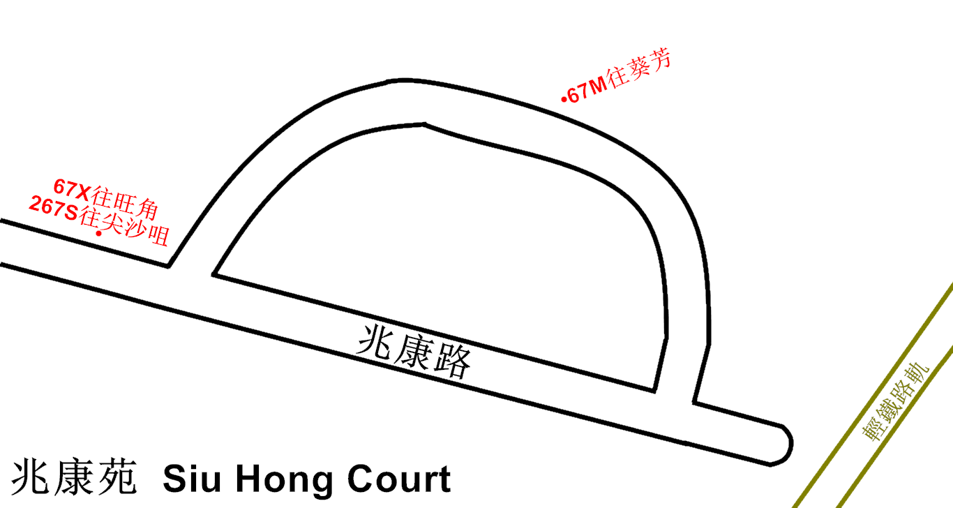 中文（香港）: 兆康苑巴士總站的平面圖